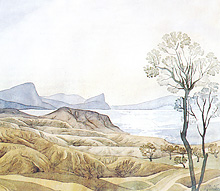 Картина Волошина "З Меганома"